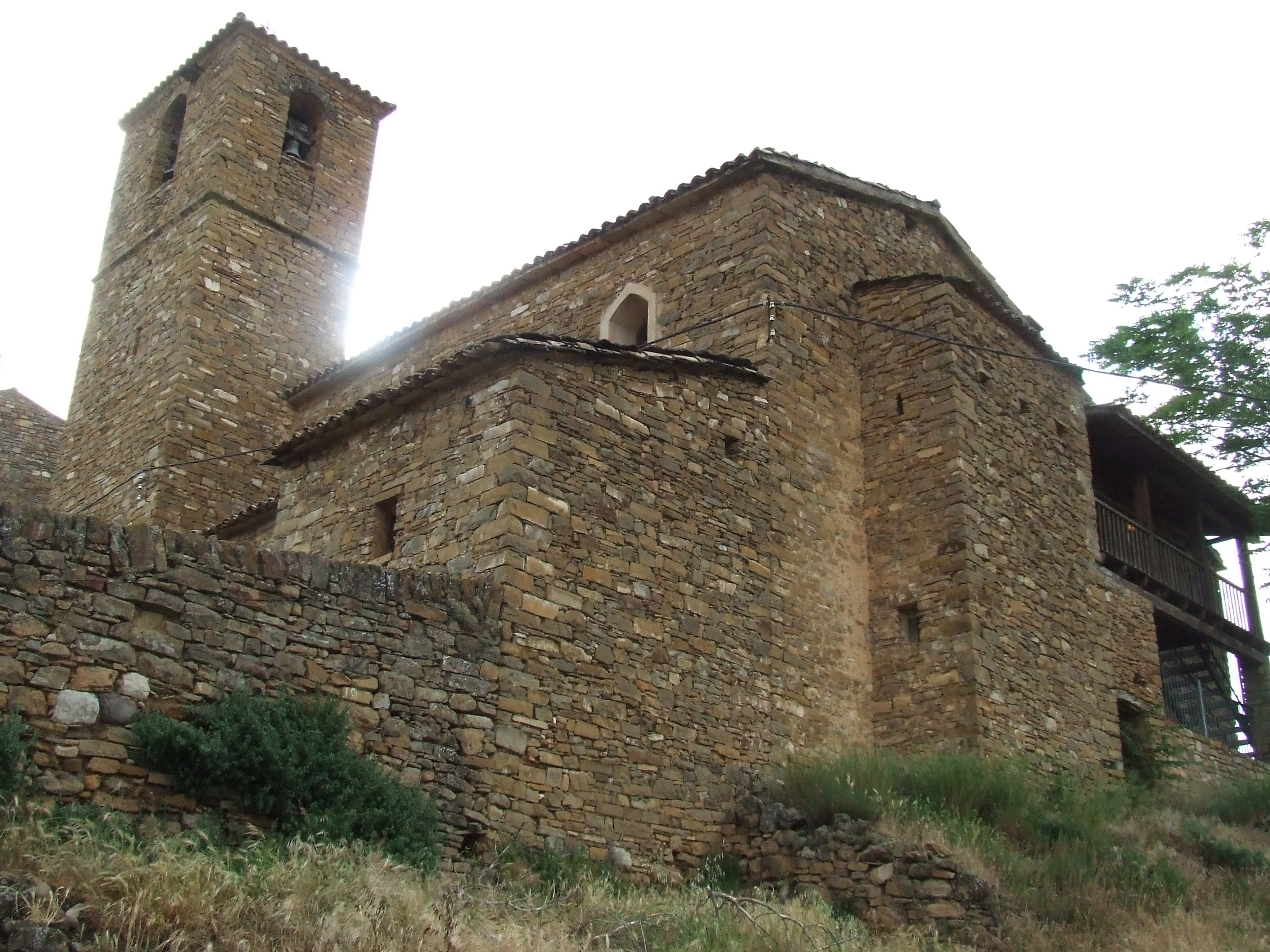 Sant Cristòfol de Claverol (Conca de Dalt, Pallars Jussà)